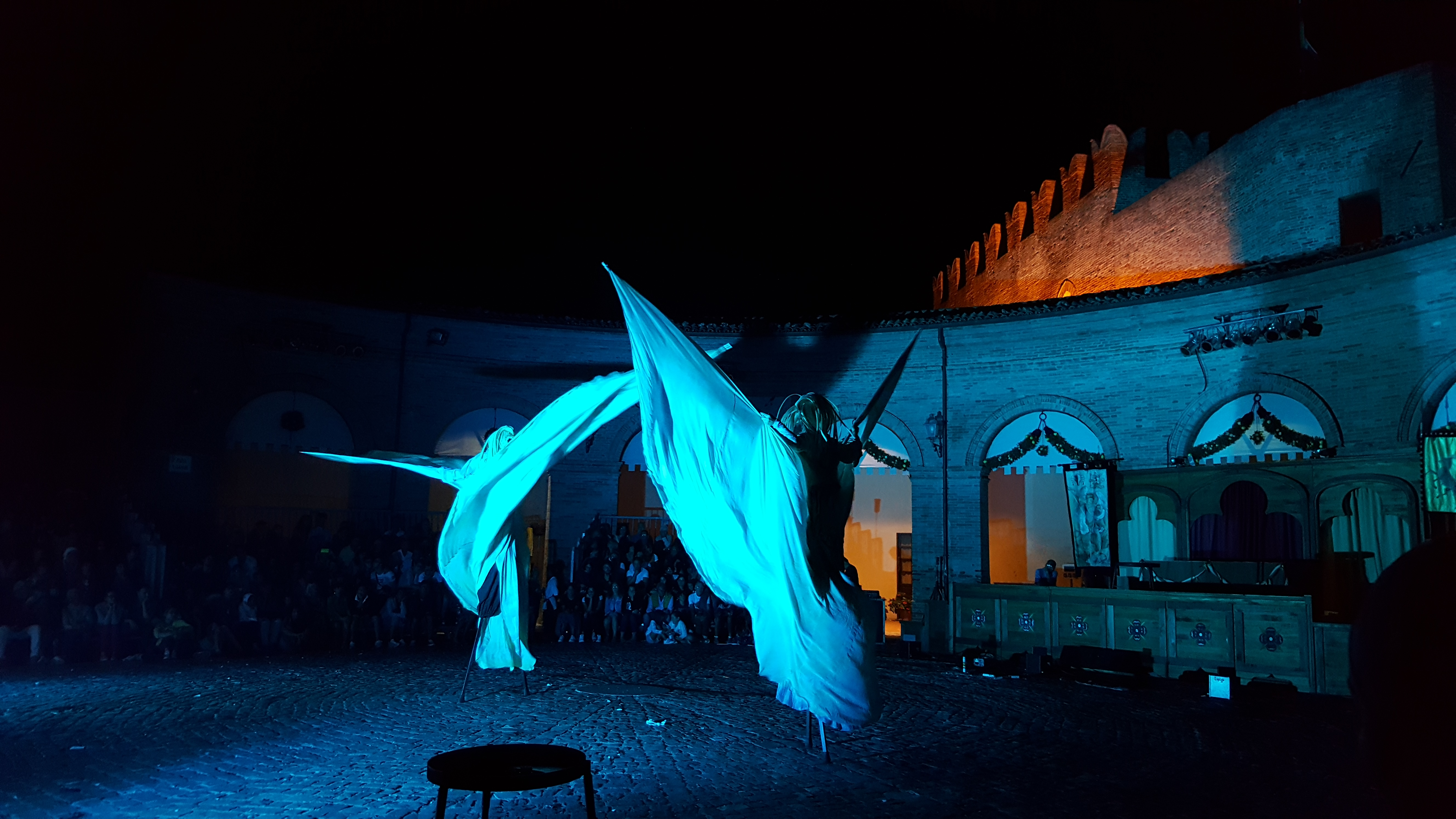 Il Palio del Daino 2016 This is a photo of a monument which is part of cultural heritage of Italy.